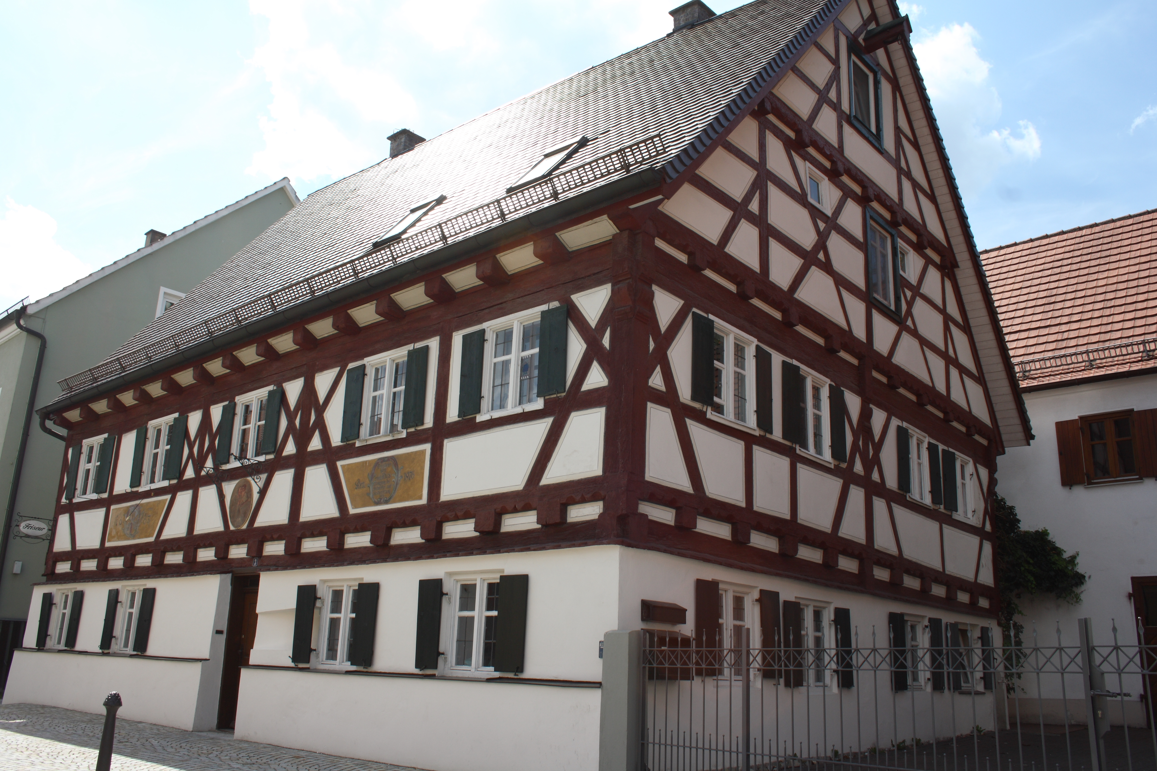 Fachwerkhaus Weldishoferhaus (Adresse: Kalteck 3) in Wertingen im Landkreis Dillingen an de Donau (Bayern)